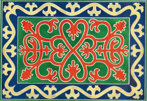 Istanga Vainakh traditional carpet